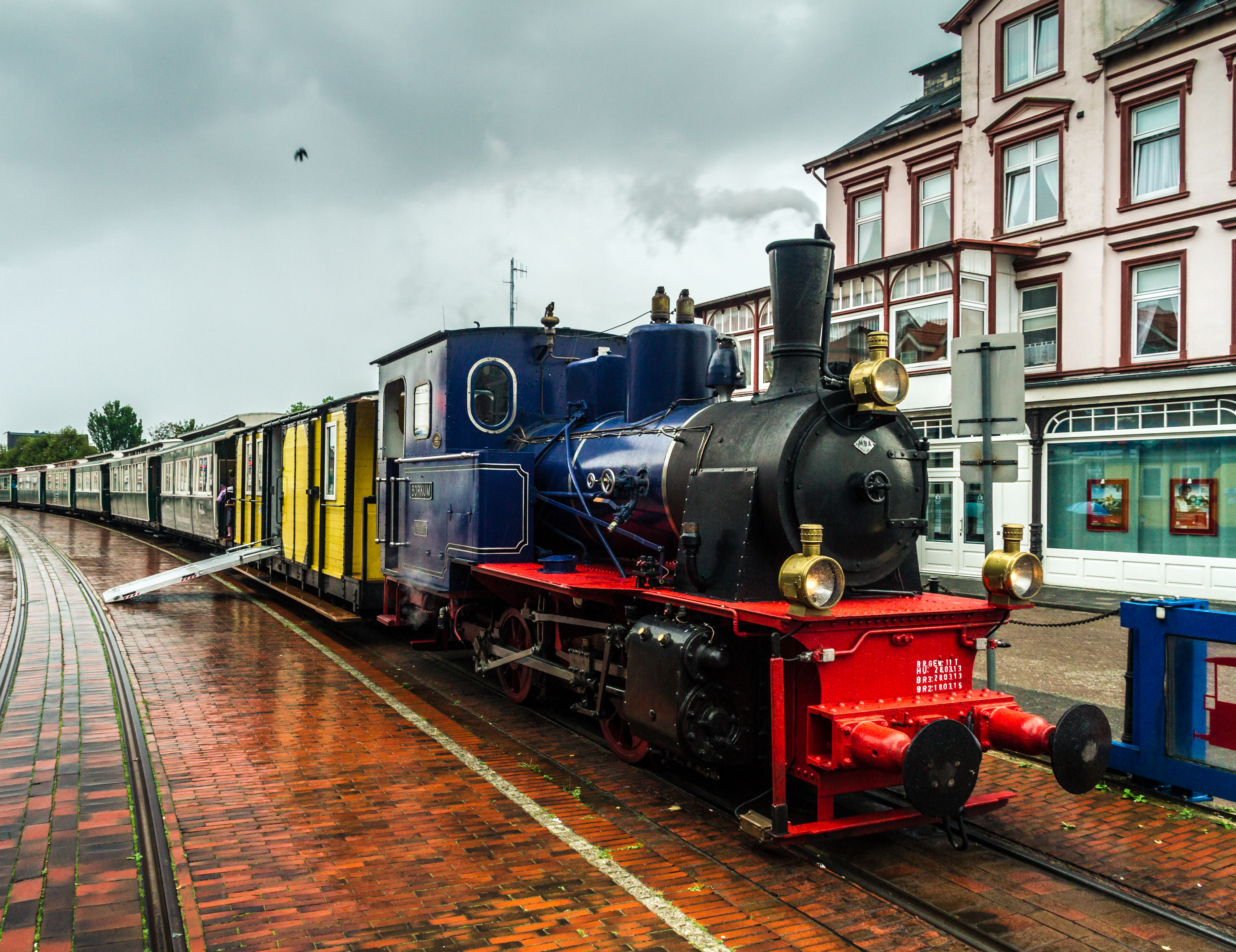 Dampflok am Bahnhof